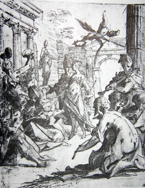 Kresba vznikla jako reakce na priviligeum Rudolfa II. Kresba se nachází v Moravské galerii v Brně.